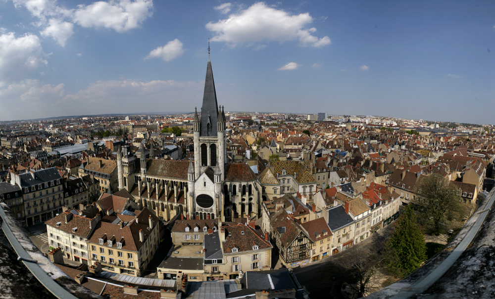 Vue depuis la Tour Philippe Le Bon. Eglise Notre dame, Hôtel de Vogüe